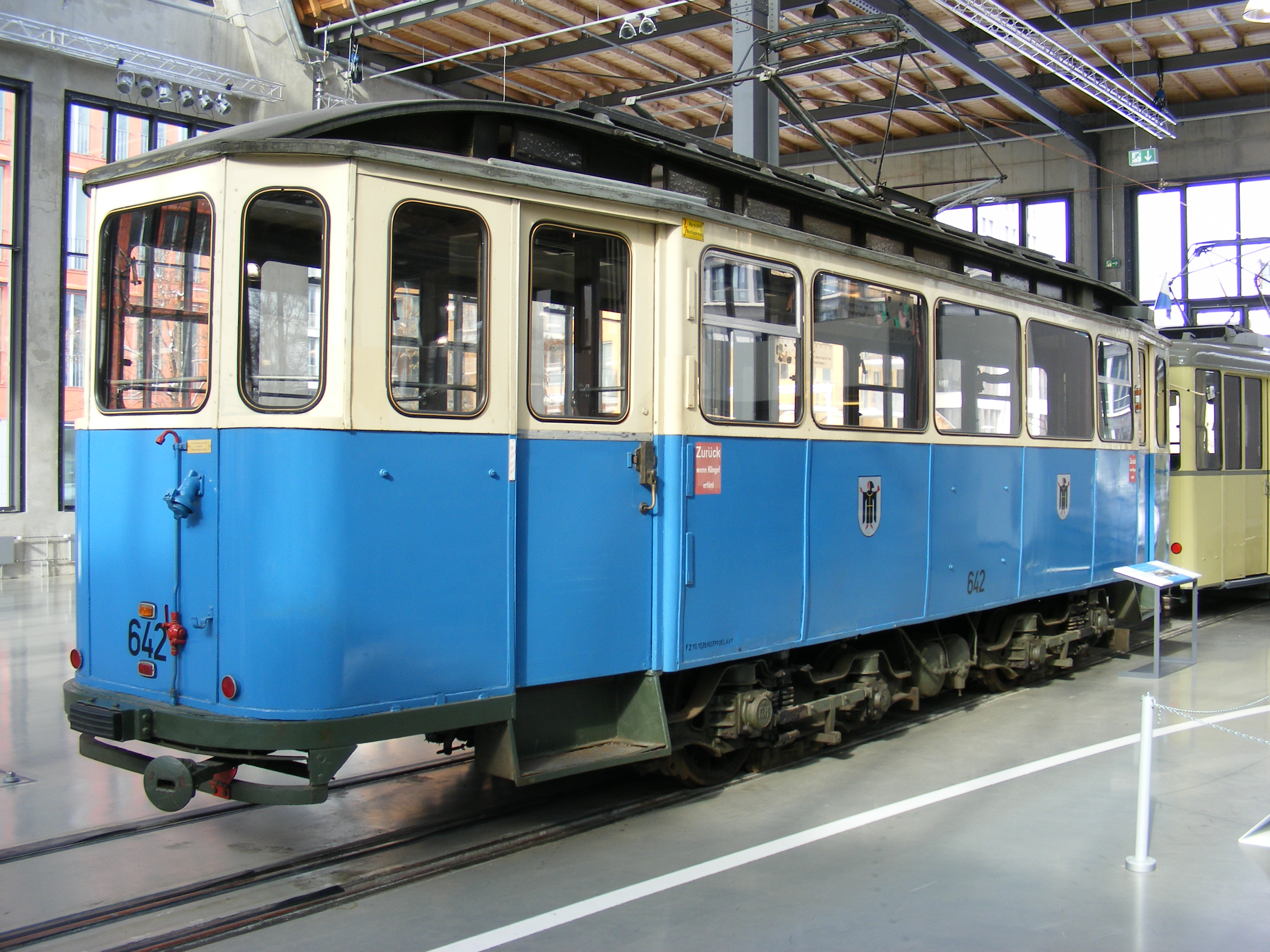 Hawa-Triebwagen 642 F 2.10 der Münchner Straßenbahn, Baujahr nicht bekannt(die F-Serie war Ende der 1930er bis Anfang der 1970er Jahre in München in Betrieb), Hersteller: Hawa, Hannover — Exponat im Deutschen Museum Verkehrszentrum München, Halle I, Inv.-Nr. 2006-341